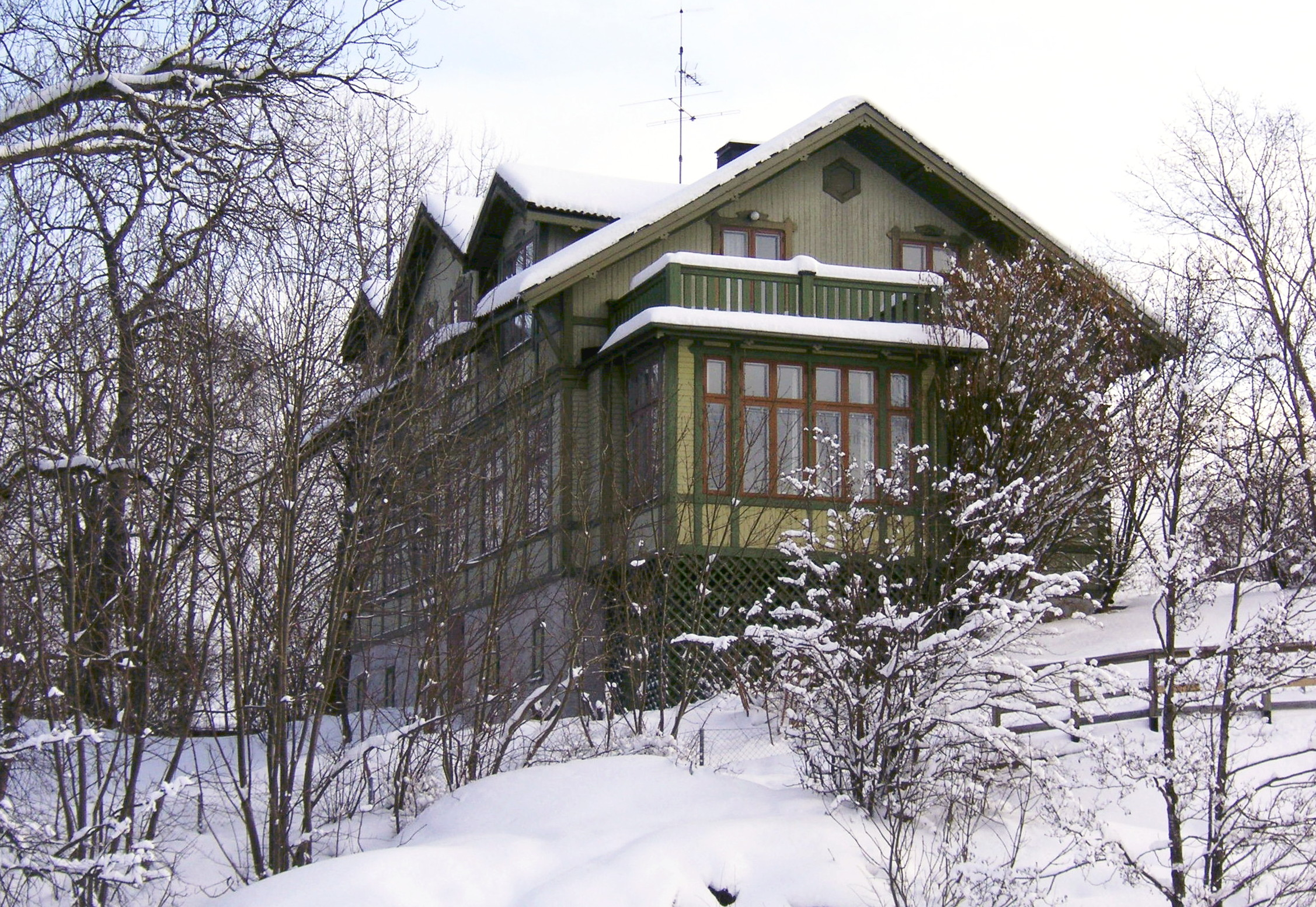 Långsjö gård 2006